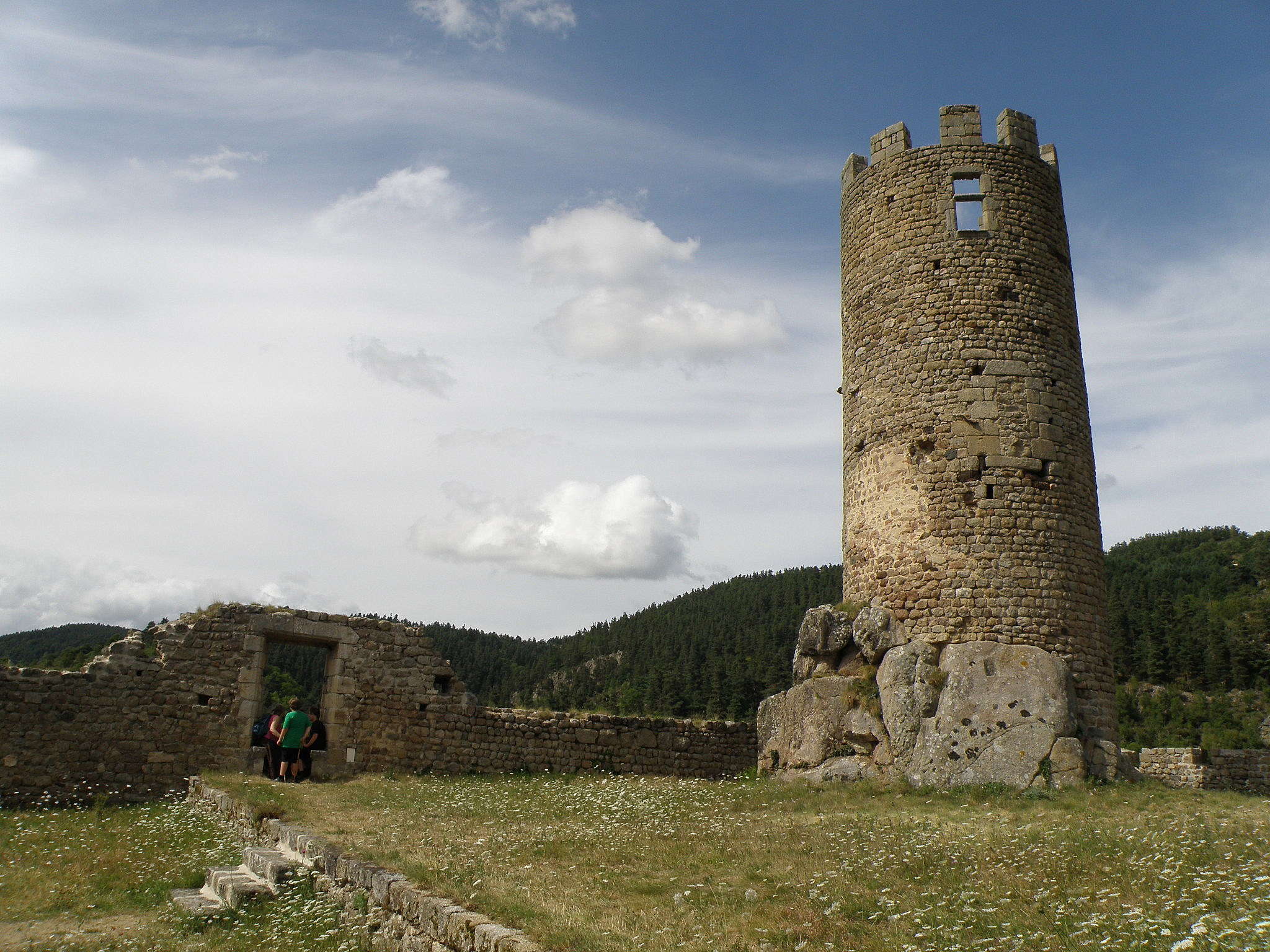 Hameau de Chalencon, appartenant à la comm. de Saint-André-de-Chalencon, dép. de la Haute-Loire, France (région Auvergne). Château: donjon.